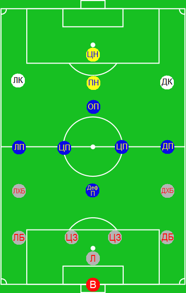 Позиции на играчите на футболното игрище